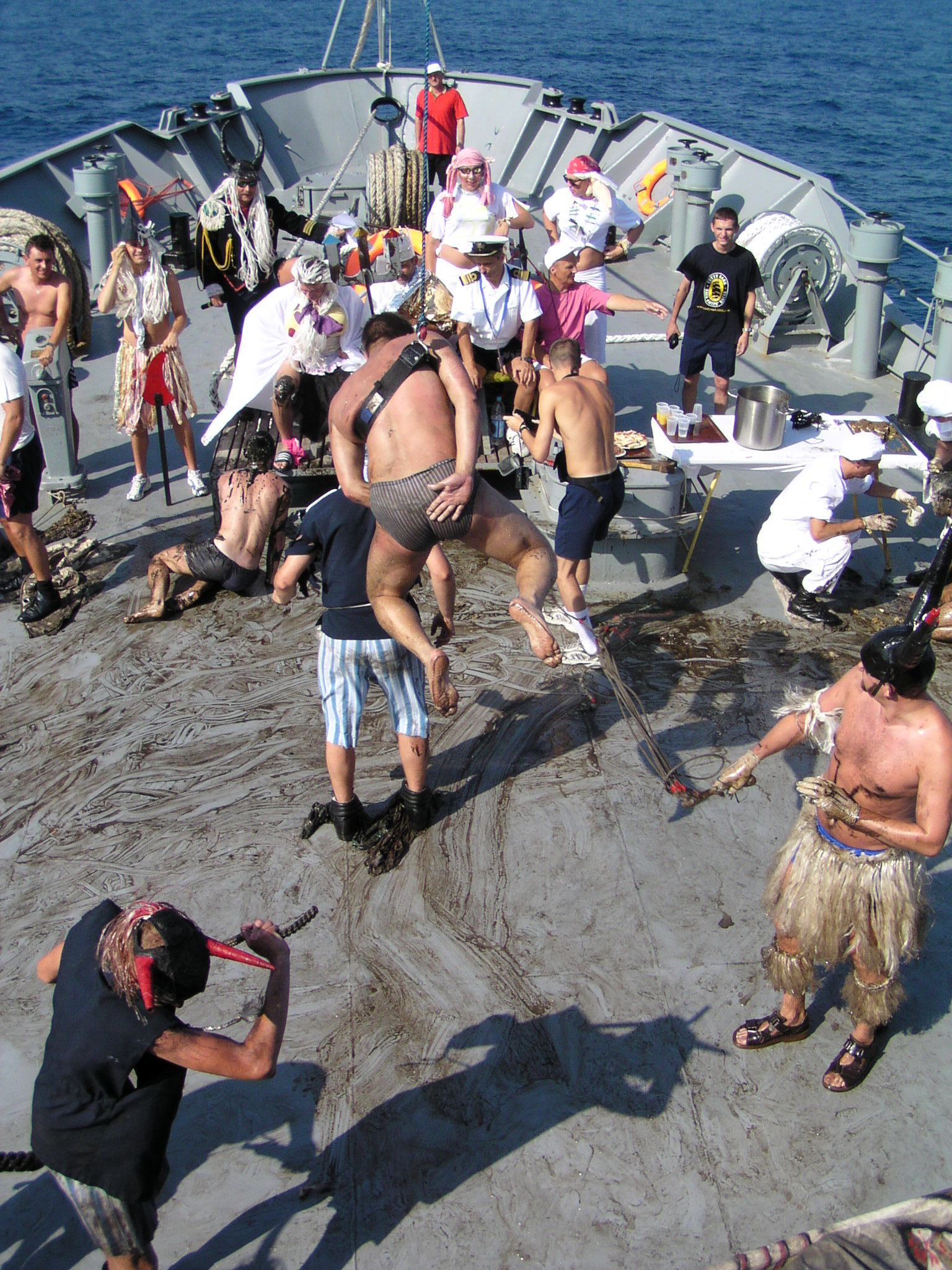 Chrzest morski na ORP Wodnik